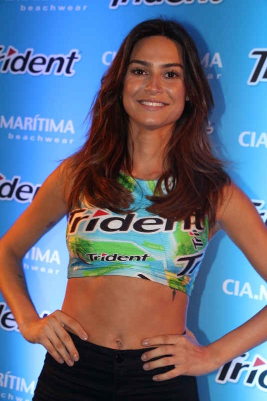 47 - Thayla Ayala-006